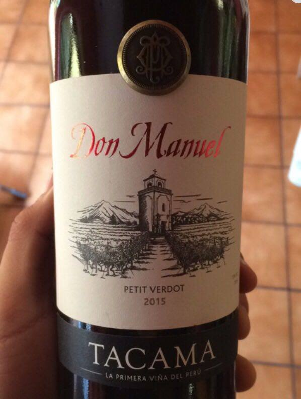 Vino Don Manuel de Tacama variedad Petit Verdot